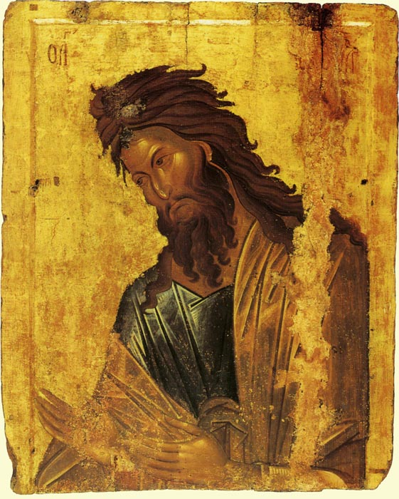 John Baptist